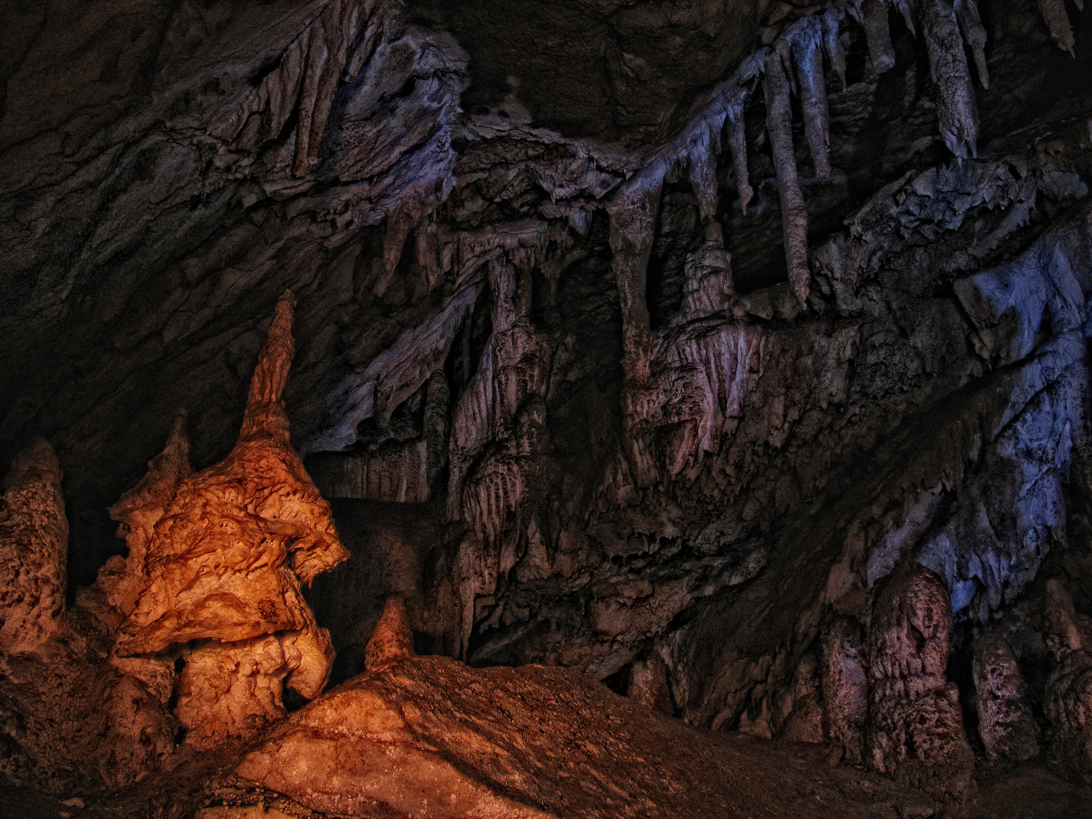 Пещера Южный слон, Урупский район This image is related to the protected area of Russia number 0910065